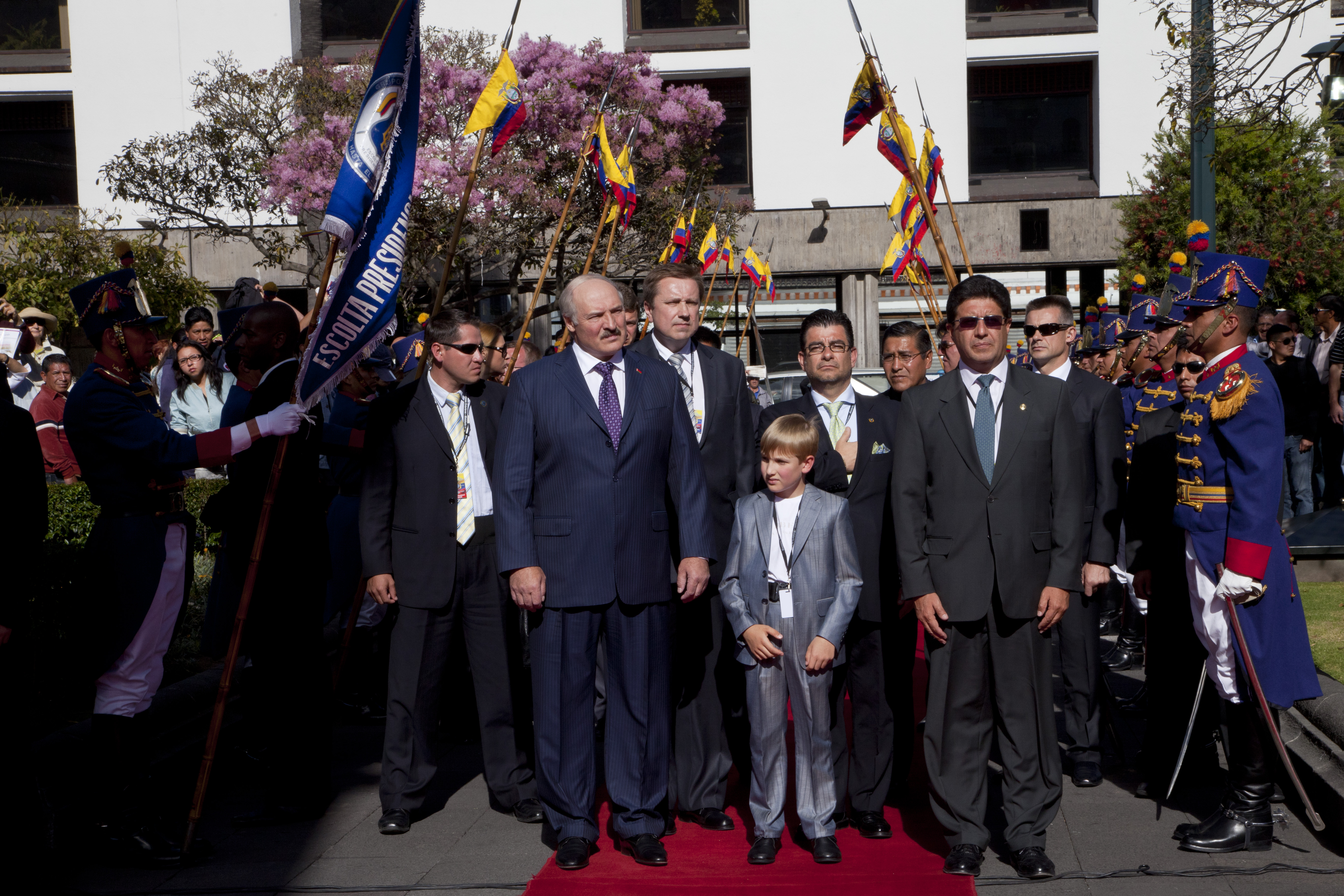 Quito (Ecuador), 27 de Junio de 2012. Esta tarde el Presidente de Belarús, Alexander Lukashenko, asistió a la Ceremonia de Colocación de la Ofrenda Floral ante el Monumento a los Héroes de la Independencia. Foto: Fernanda LeMarie - Ministerio de Relaciones Exteriores, Comercio e Integración.